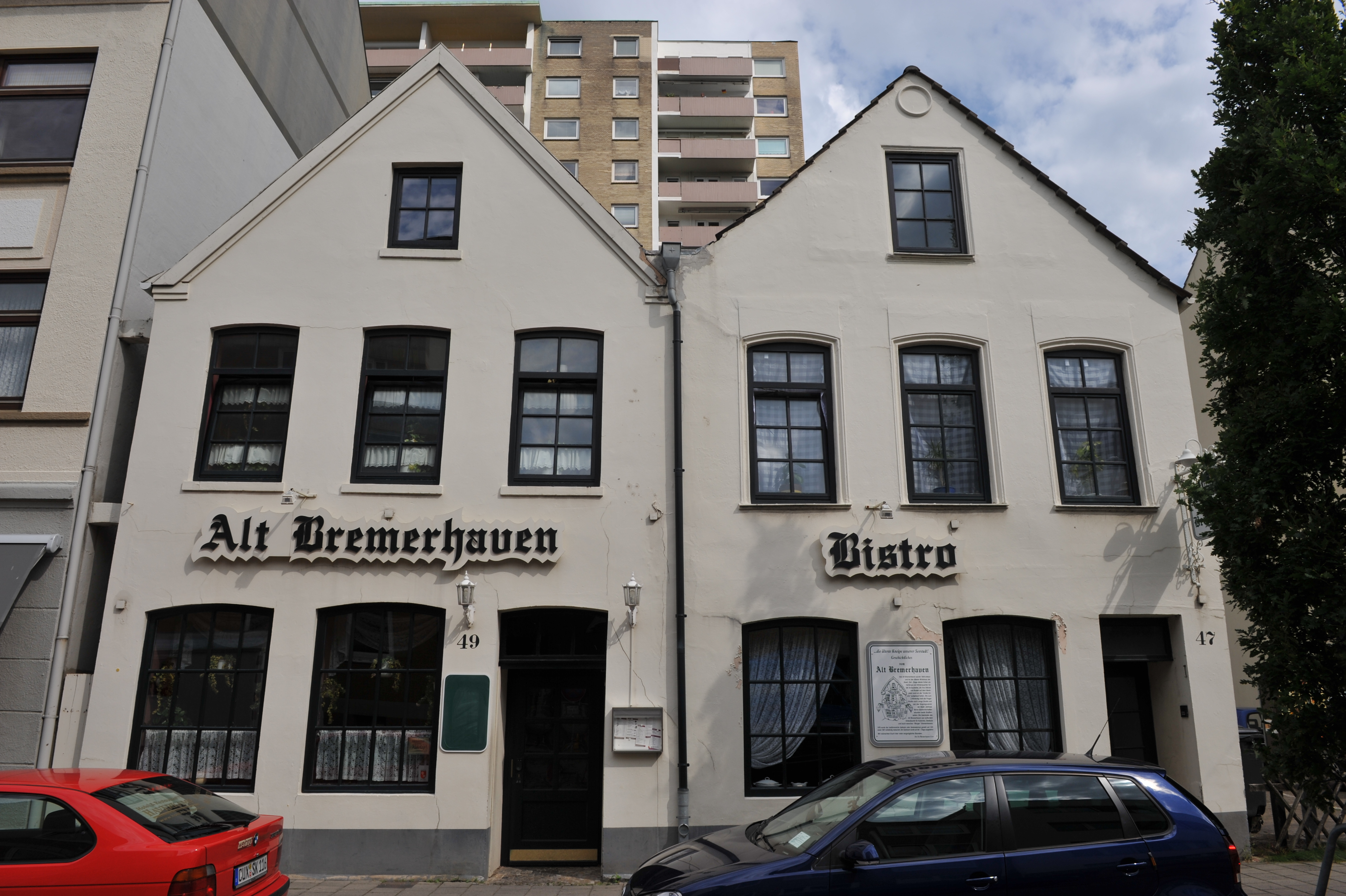 Historical building in Bremerhaven, northern Germany Prager Straße 47 und 49, Wohnhaus, um 1850, Umbau 1862 (1982) Haus Nr. 47 (rechts) ist ein geschütztes Kulturdenkmal in der Freien Hansestadt Bremen, mit der Nr. 1547 beim Landesamt für Denkmalpflege registriert. Haus Nr. 49 ist ein geschütztes Kulturdenkmal in der Freien Hansestadt Bremen, mit der Nr. 1548 beim Landesamt für Denkmalpflege registriert.